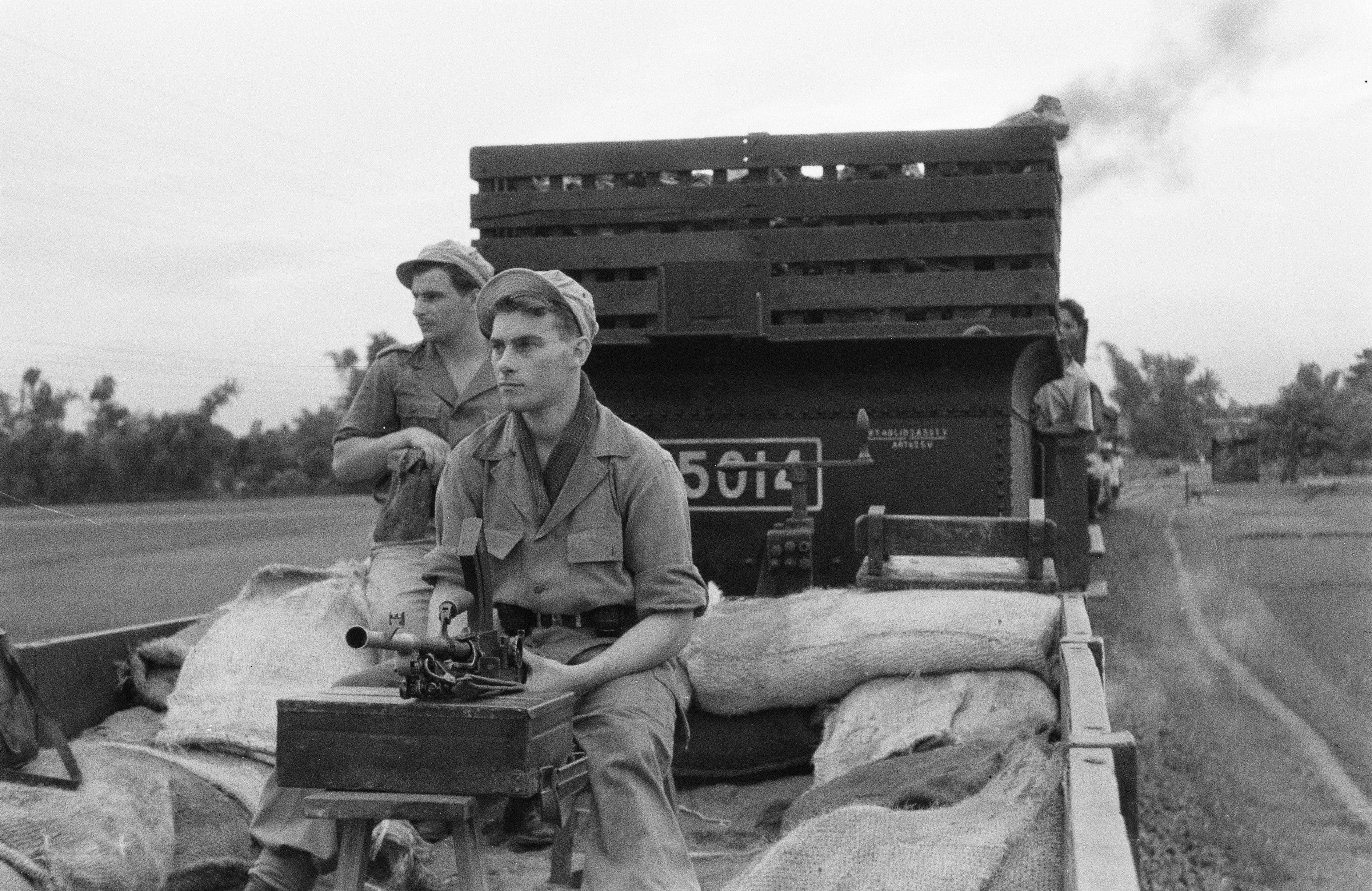 Collectie / Archief : Fotocollectie Dienst voor Legercontacten Indonesië Reportage / Serie : [DLC] Madioen: treinbeveiliging Beschrijving : Bescherming van een trein bij Madioen, door jager Bal uit IJmuiden en Karel Horsman uit Leiden Datum : 10 februari 1949 Locatie : Indonesië, Java, Madioen, Nederlands-Indië Fotograaf : Kellenbach, F.C. / DLC Auteursrechthebbende : Nationaal Archief Materiaalsoort : Negatief (zwart/wit) Nummer archiefinventaris : bekijk toegang 2.24.04.02 Bestanddeelnummer : 3373